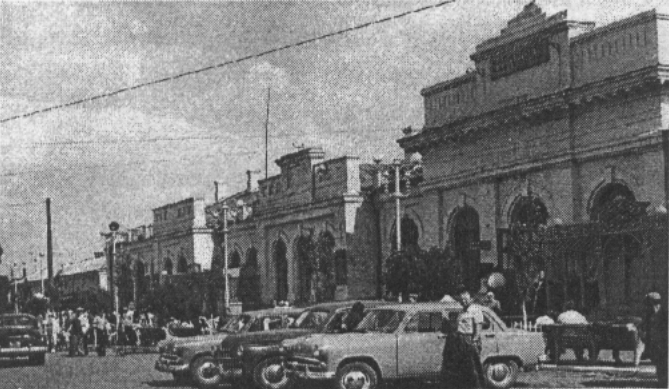 Залізничний вокзал в Маріуполі. 50-60 роки.